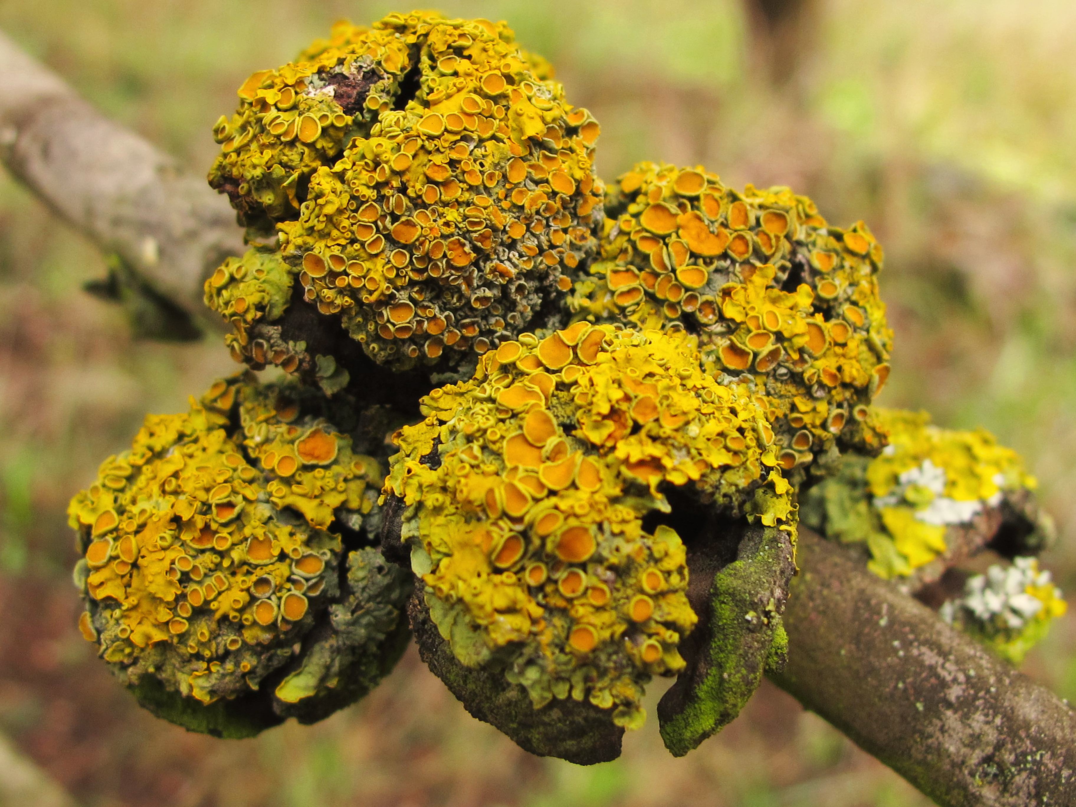 Xanthoria parietina De color amarillo anaranjado a rojo, formado por lóbulos de tamaño desigual, entre 1 y 5 mm de ancho, Esta especie de liquenes fue descrita por carl linnaeus en 1973 como Lichen parietinus